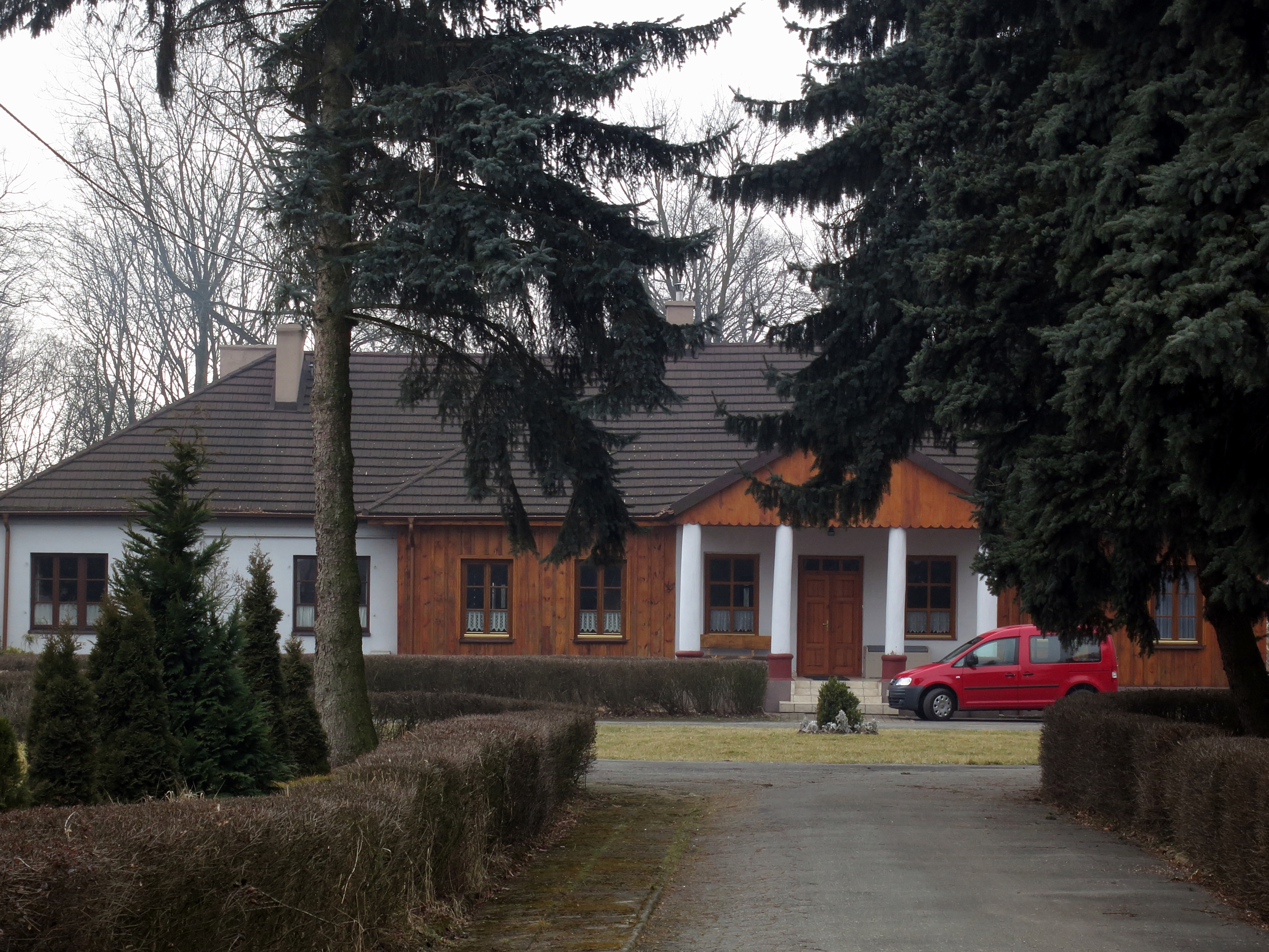 Dziepółć, dwór, XVIII, XIX